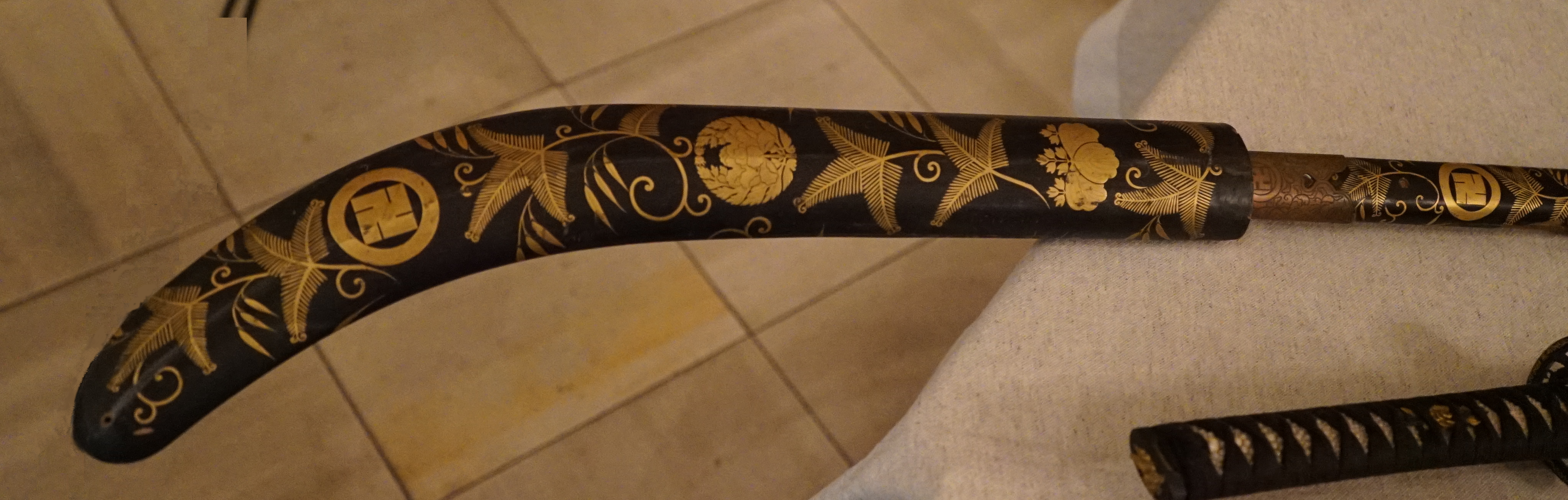 issu de la Collection Alfred Gérard. Naginata décoré des blasons de Noriko fille de Hachisuka Shigeyoshi et de Masahiro fils de Takatsukasa Sukehira.